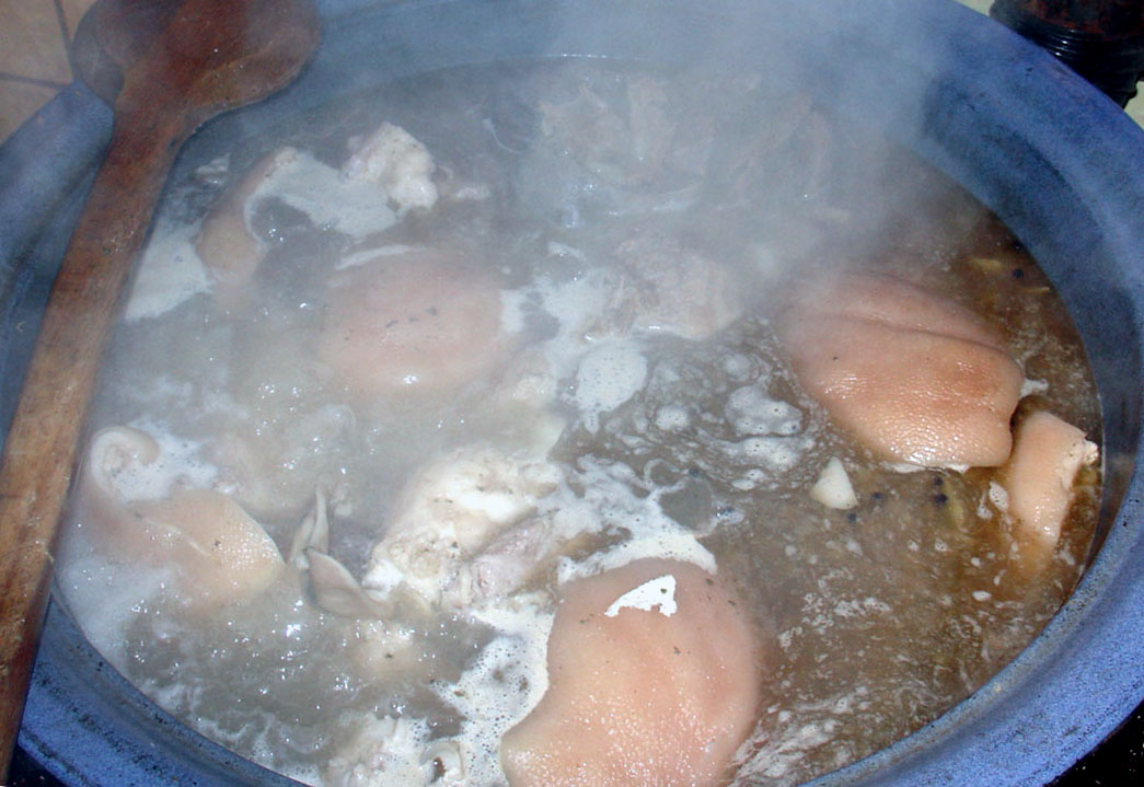 Wurstbrühe beim Kochen (Hausschlachtung)